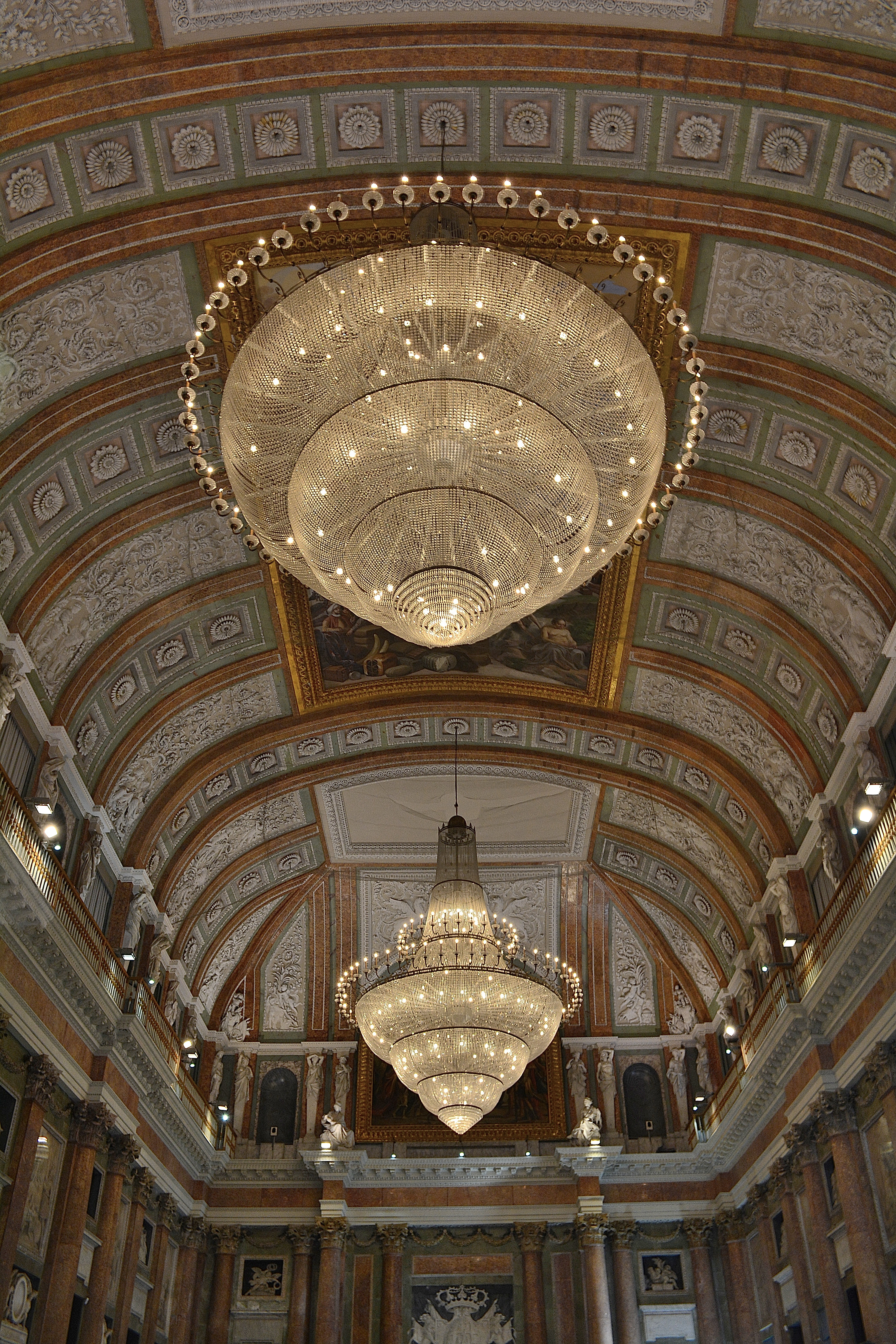 Palazzo Ducale di Genova This is a photo of a monument which is part of cultural heritage of Italy.